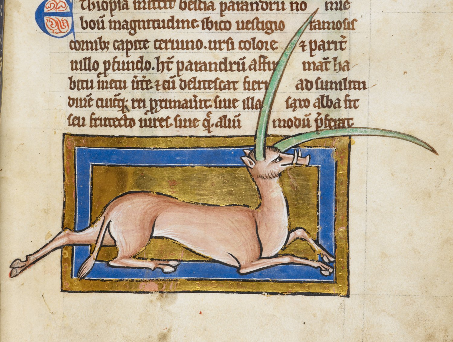 Eale, enluminure d'un bestiaire du début du XIIIe siècle en latin, Angleterre